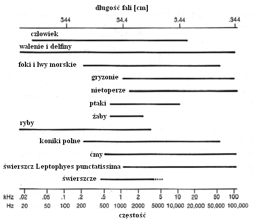 wykres przedstawiający zakres słyszalnych dźwięków u zwierząt.